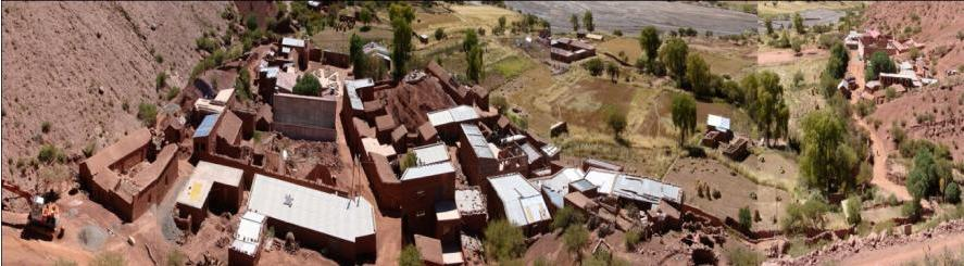 Vista general de Mojinete, localidad del sur oeste del Departamento de Potosí, Bolivia